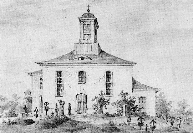 Die Alte Kirche in Dresden-Klotzsche, 1. Hälfte des 19. Jahrhundert, Stich eines unbekannten Künstlers